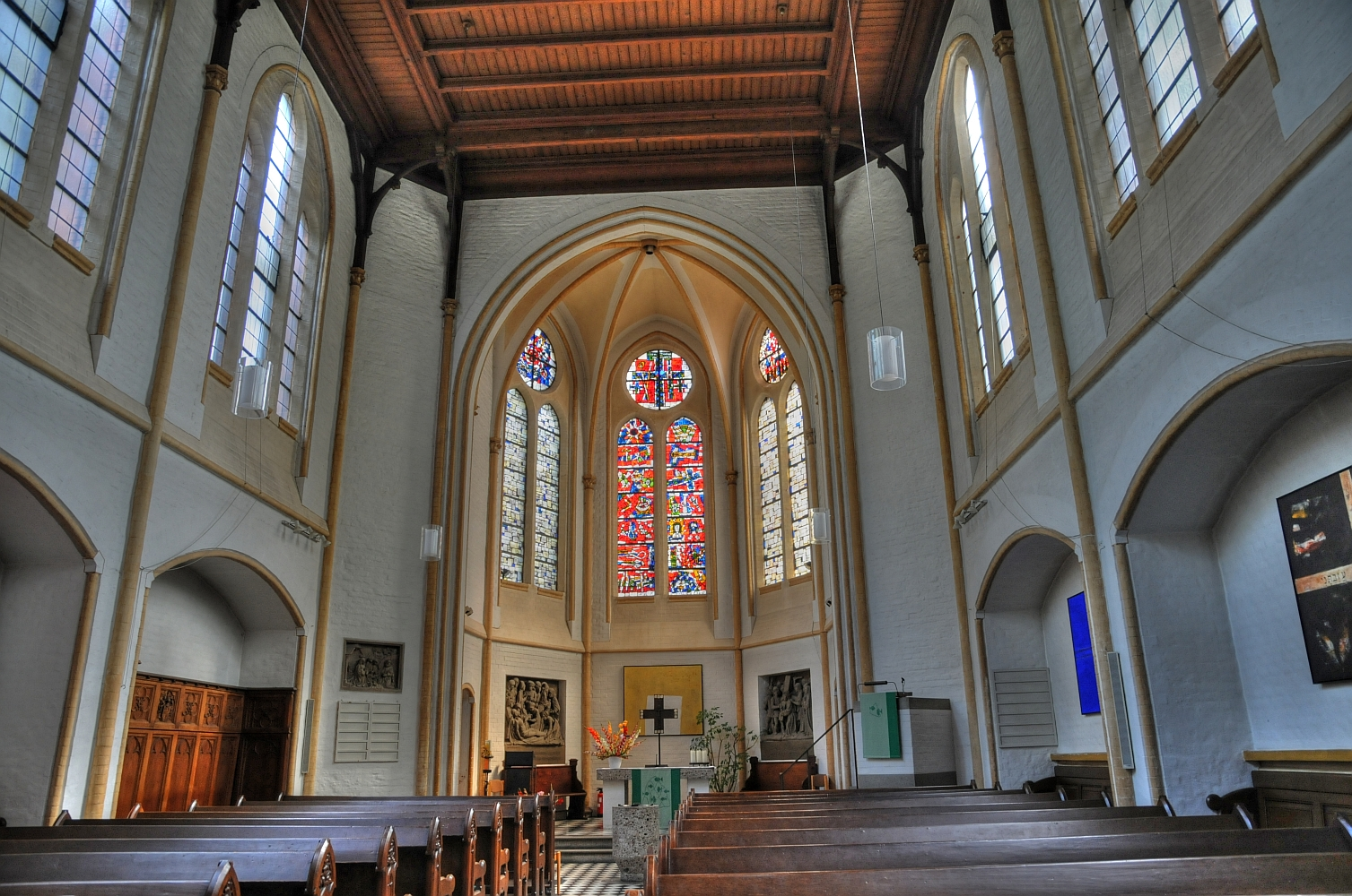 Innenaufnahme Erlöserkirche in Rosenheim, Bayern, Deutschland